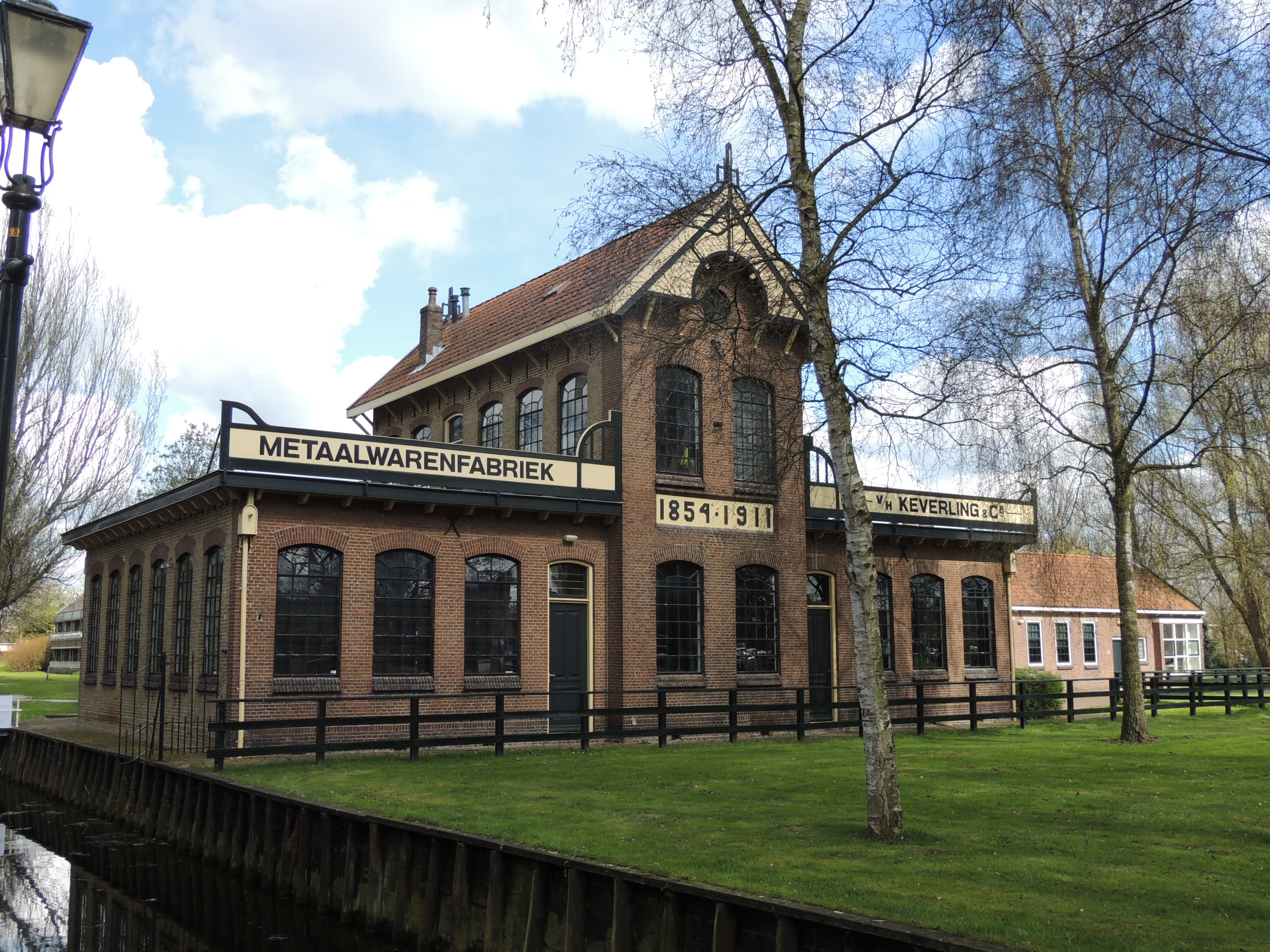 Voorm. geelgieterij Keverling, ovengebouw en slijperij, Joure